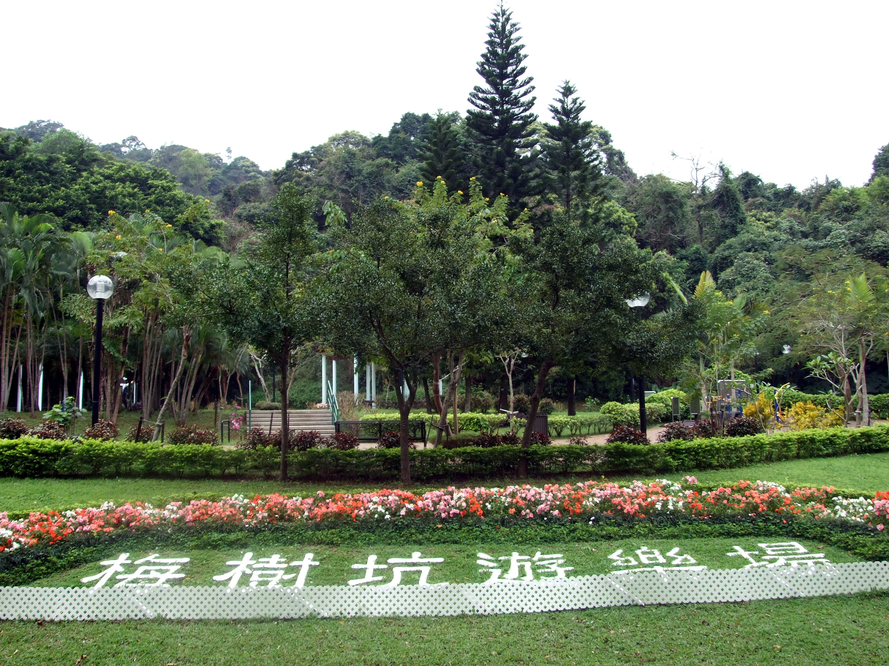 中文（香港）: 梅樹坑遊樂場